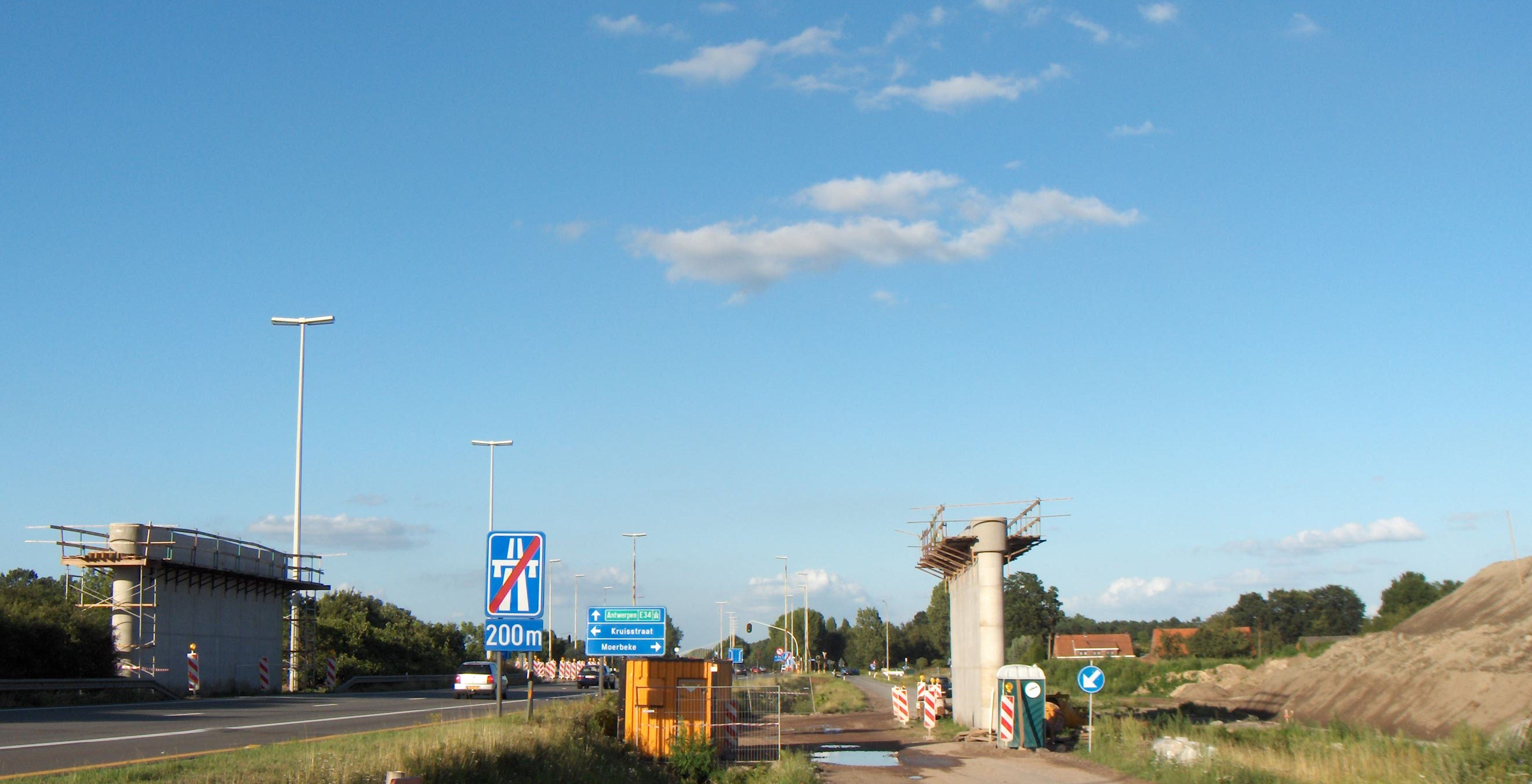 Omvorming van de gelijkvloerse kruising van de N49/E34 met de lokale weg Moerbeke-Waas - Nederland tot een op- en afrittencomplex. Aanleg van een viaduct met op de achtergrond het bestaande kruispunt met verkeerslichten